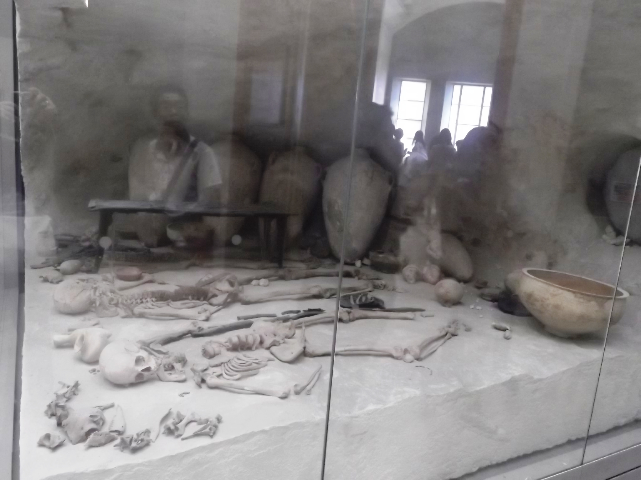 بعض الآثار المصرية القديمة بالمتحف البريطاني بلندن.